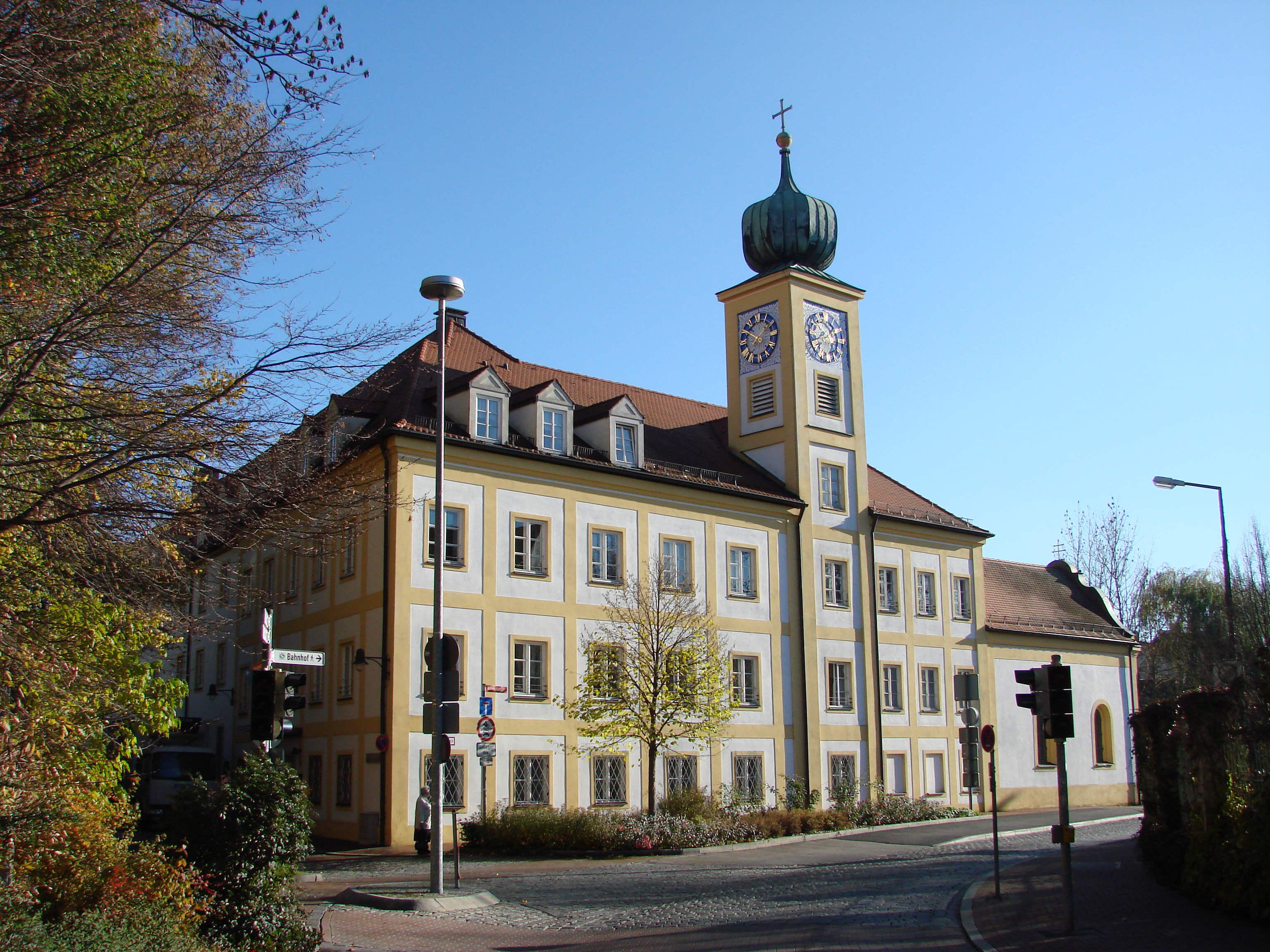 Vinzentinums mit Altöttinger Kapelle in Freising